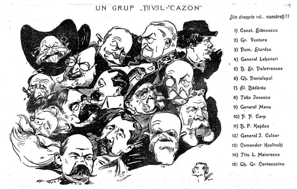 Un grup Țivil-Cazon, în gazeta Țivil-Gazon, nr. 6 / 1906